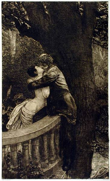 Im Park, from Eine Leibe (Opus X, pl. 4)